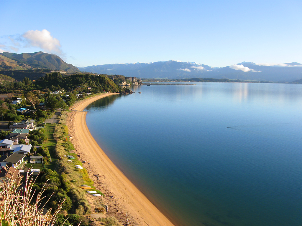 Tata Beach and Tata Bay